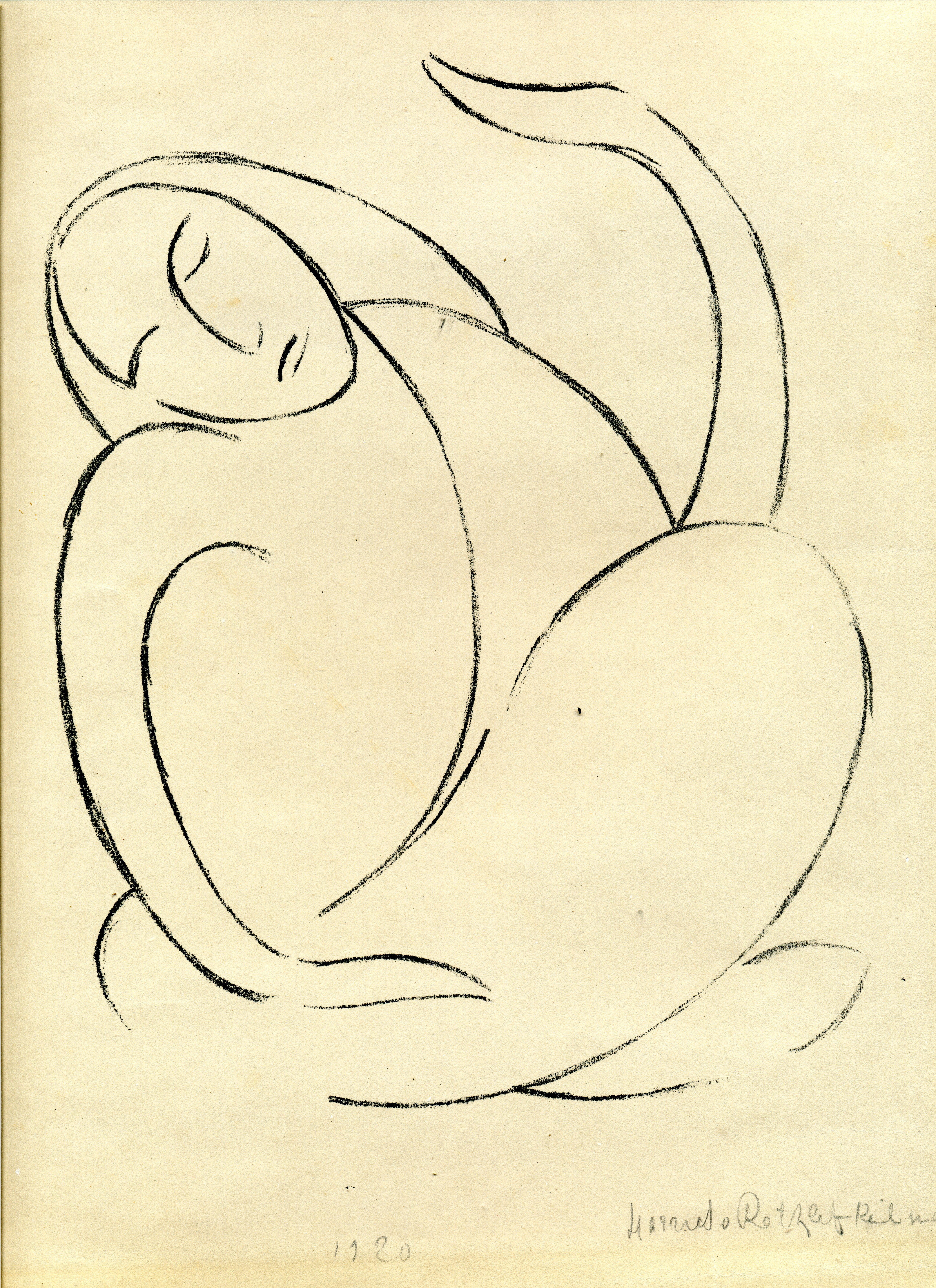 Lithographie "Hockende Frau" von Harriet von Rathlef-Keilmann, hergest. Druckwerkstatt des Weimarer Bauhauses